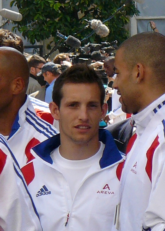 Renaud Lavillenie, athlète français (saut à la perche), lors de la réception à l'Élysée des médaillés de Barcelone , le 3 août 2010.